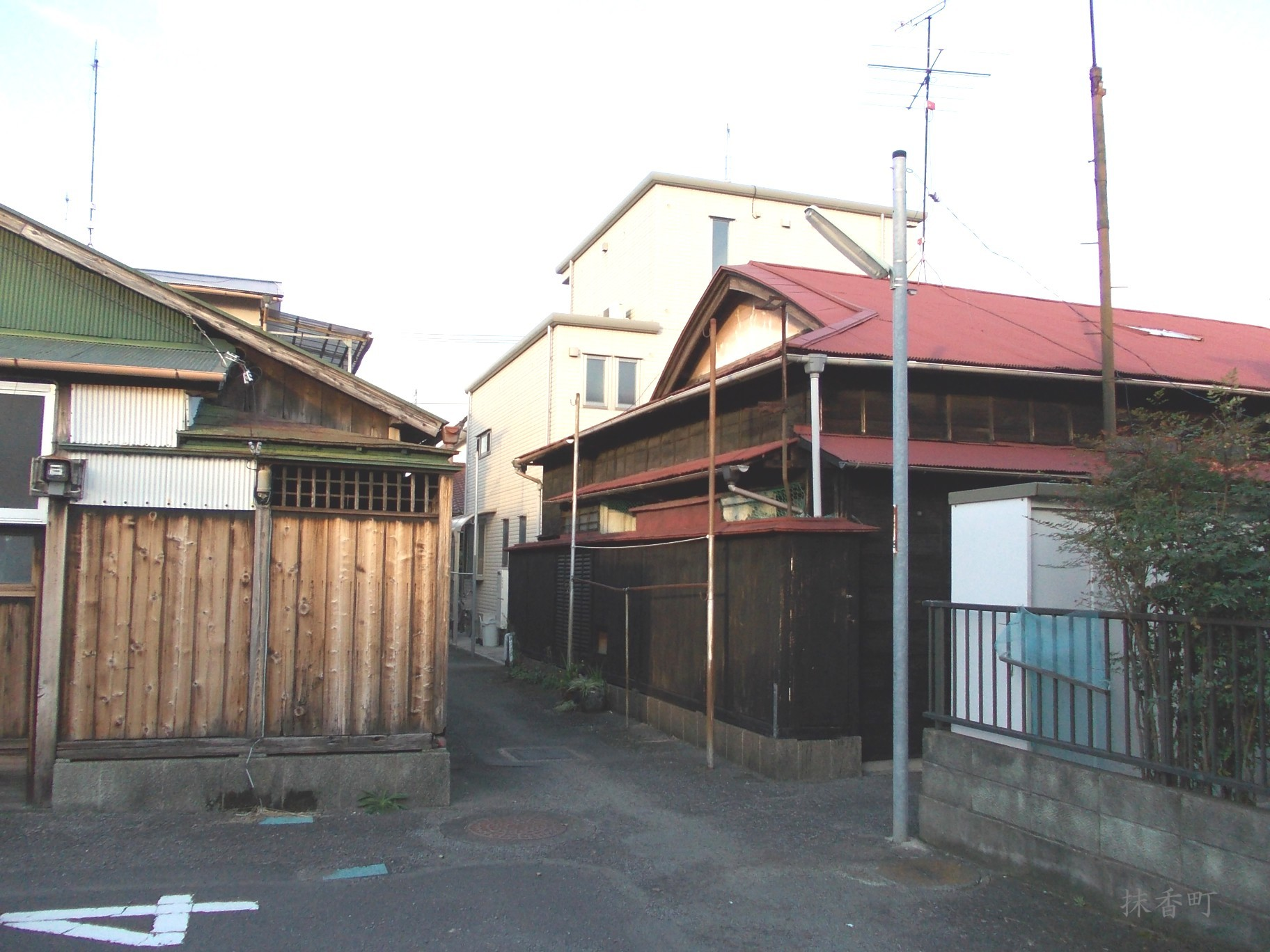 小田原市内旧抹香町